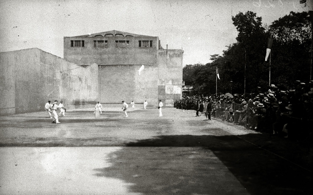 PARTIDO DE REBOTE EN EL FRONTON DE ATOCHAEuskara: Aotxako pilotalekua. Oinarrian Errebote pareta zuen. Gero ezker paretta eraiki zitzaion